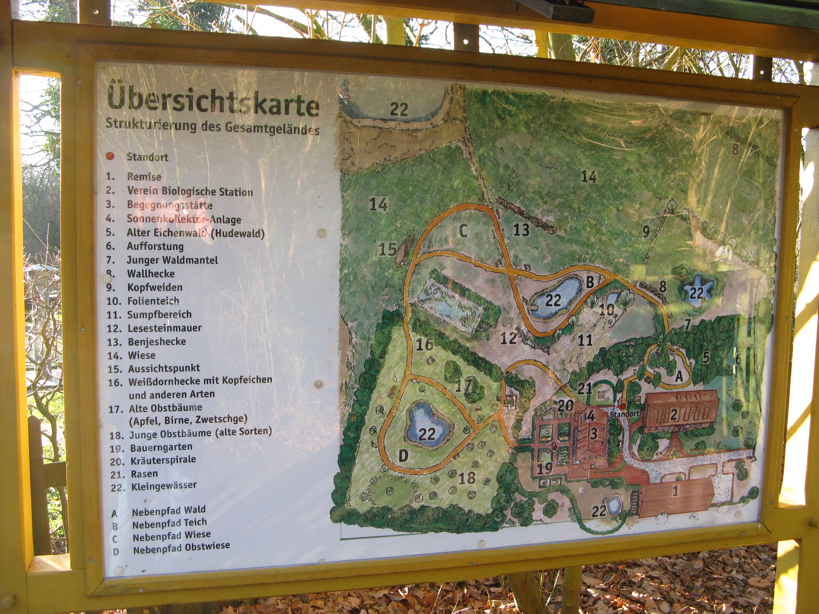 Abbildung der Übersichtskarte des Naturschutzgebietes Nordholz bei Minden, Nordrhein-Westfalen.